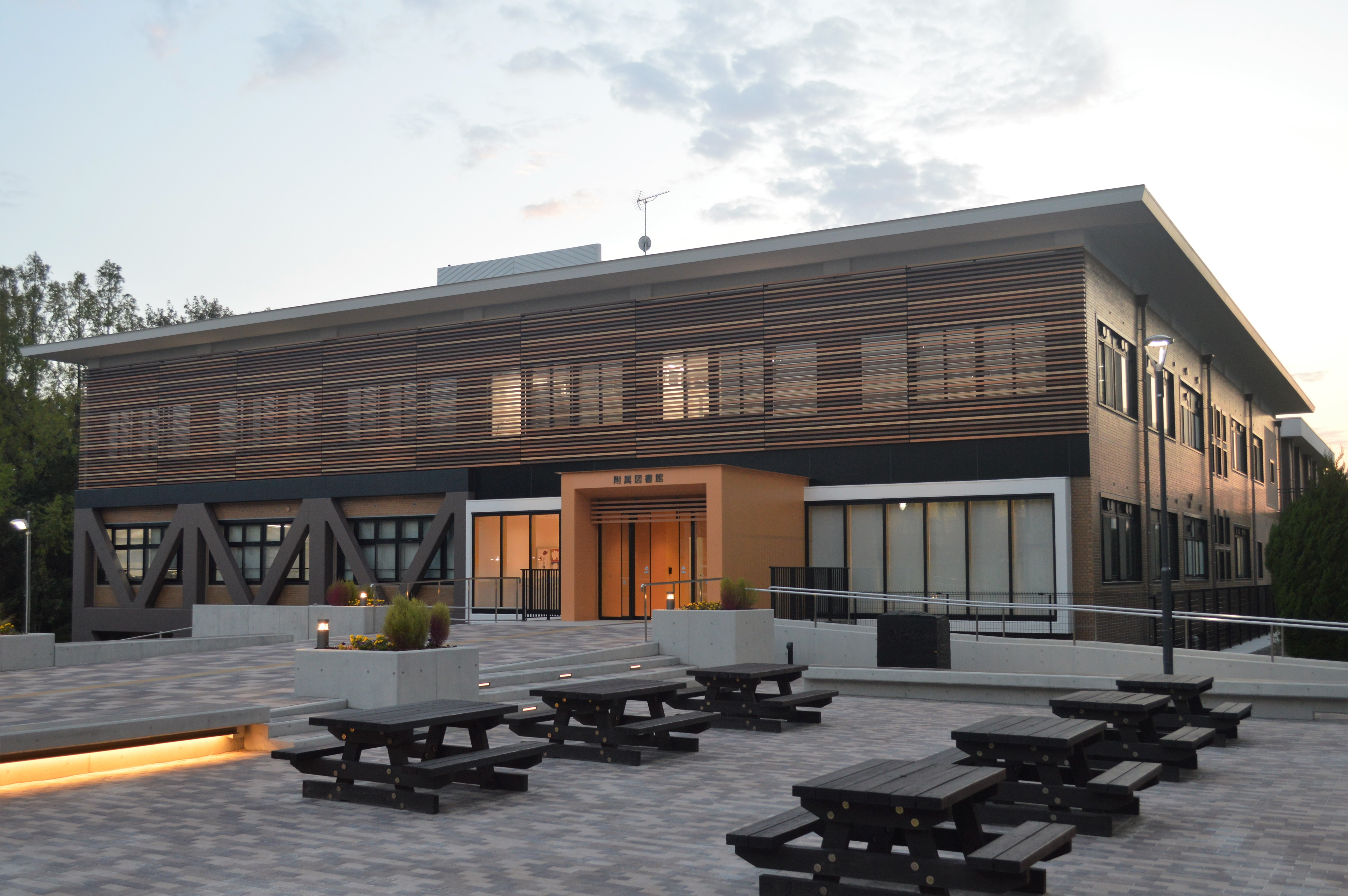 愛知県刈谷市にある愛知教育大学附属図書館。2017年10月2日のリニューアル開館直後。